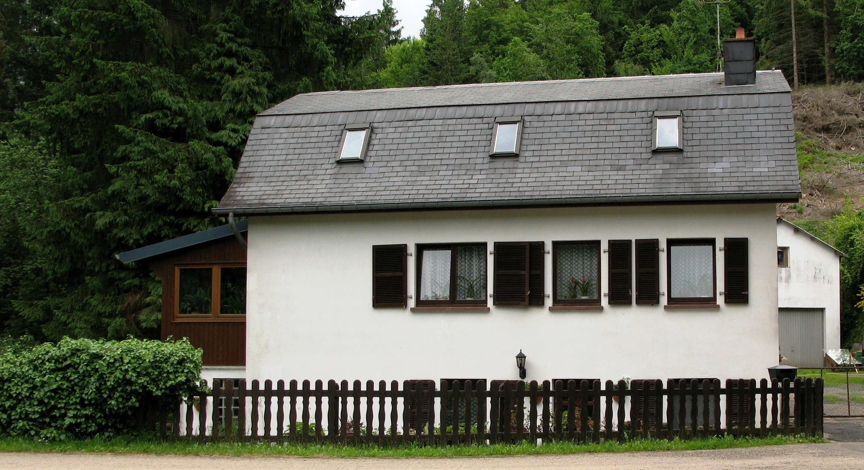 D'Kléimillen am Mee 2008.